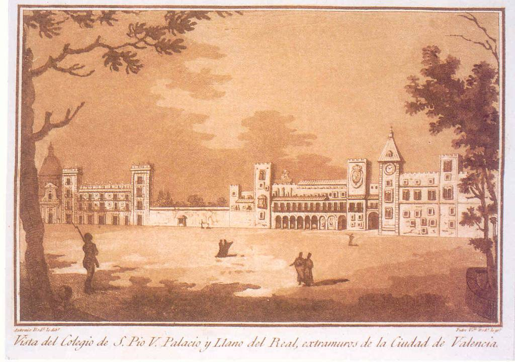 Vista del Palau Reial de valència, o del Real, en una gravat de Pedro Vicente Rodríguez sobre il·lustració de Antonio Rodríguez.